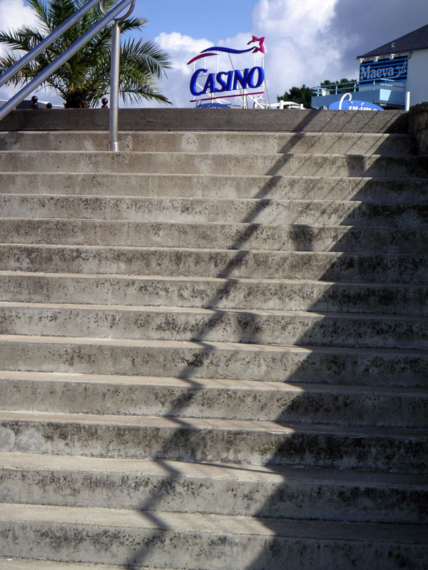 Le Casino de Bénodet vu de la plage.